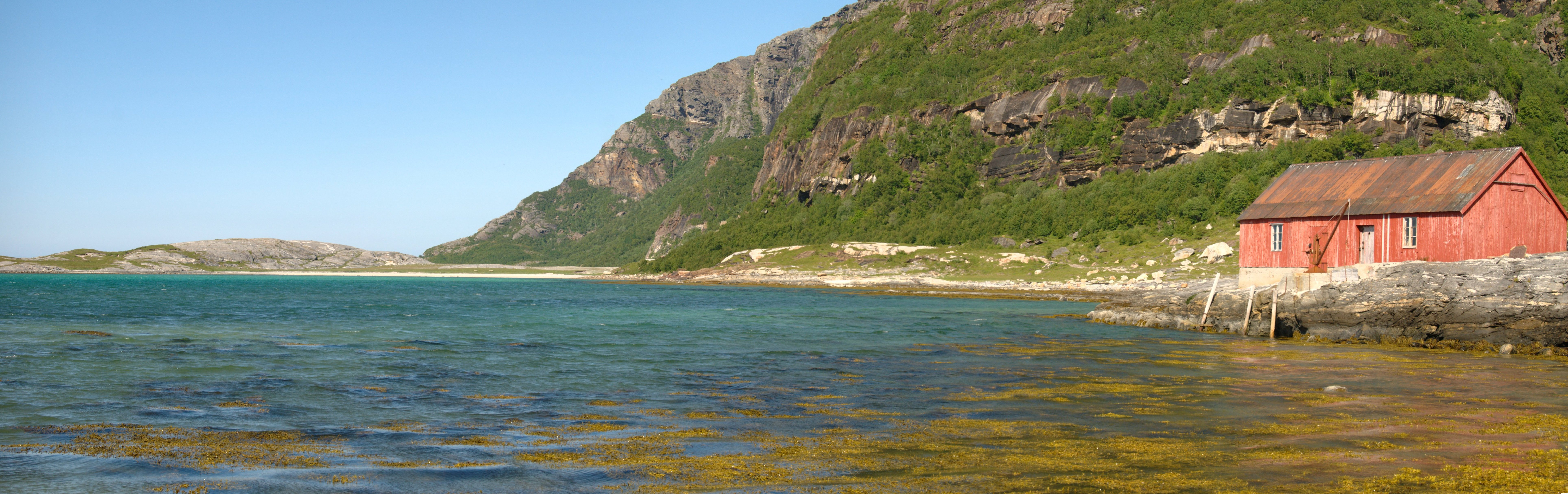 Mjeldevika